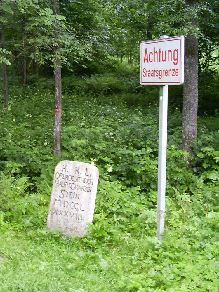 Grenzstein aus 1788 zwischen den Provinzen Oberösterreich und Böhmen. Die genaue Vermessung der Provinzgrenze war Rosenauers Projekt bevor er sich dem Kanalentwurf widmete.